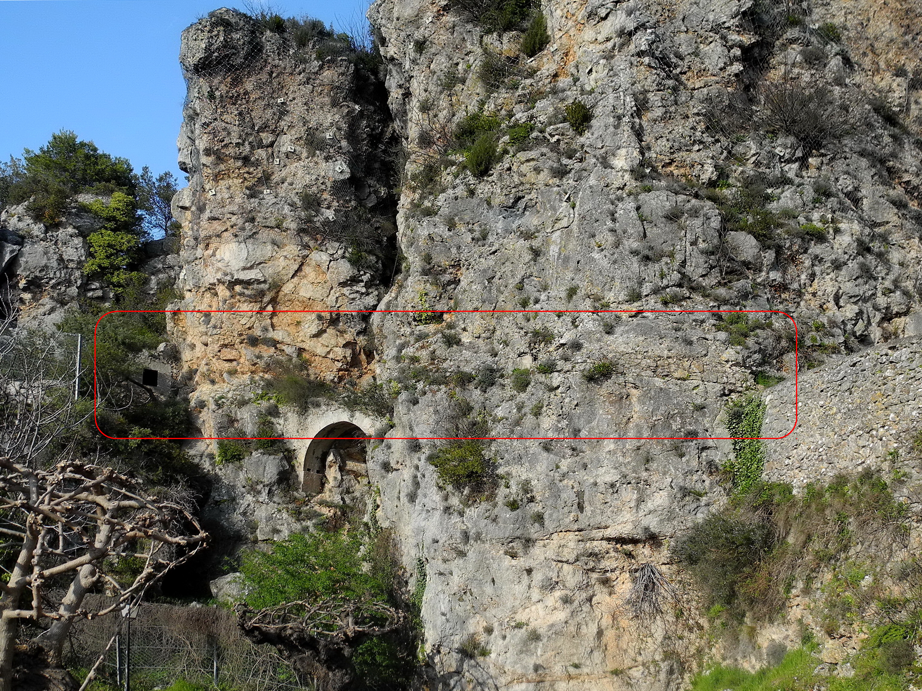 Aqueduc de Chateaudouble (Var)